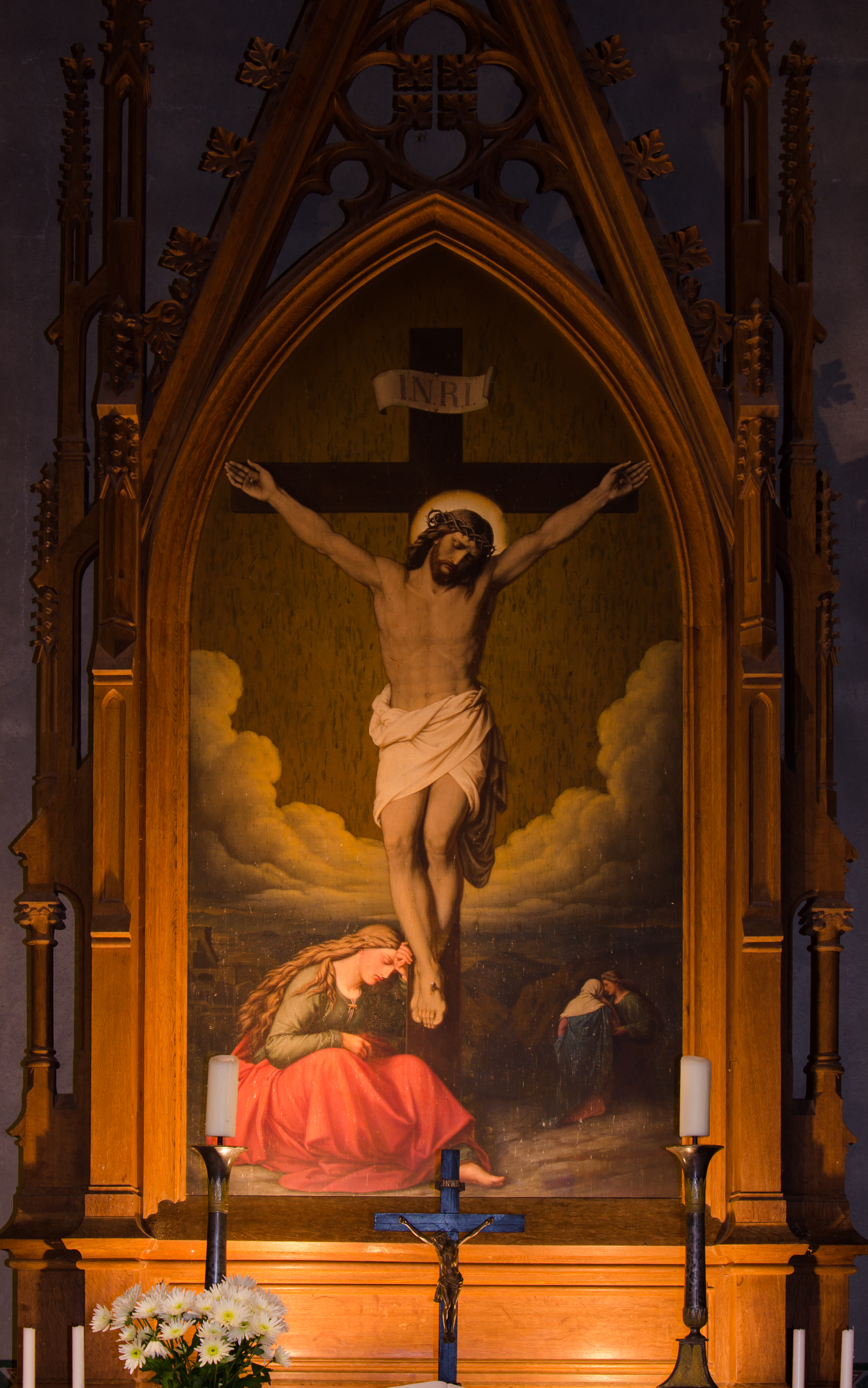 Poppentin Kirche Altarbild; Kopie nach Carl Gottfried Pfannschmidt.